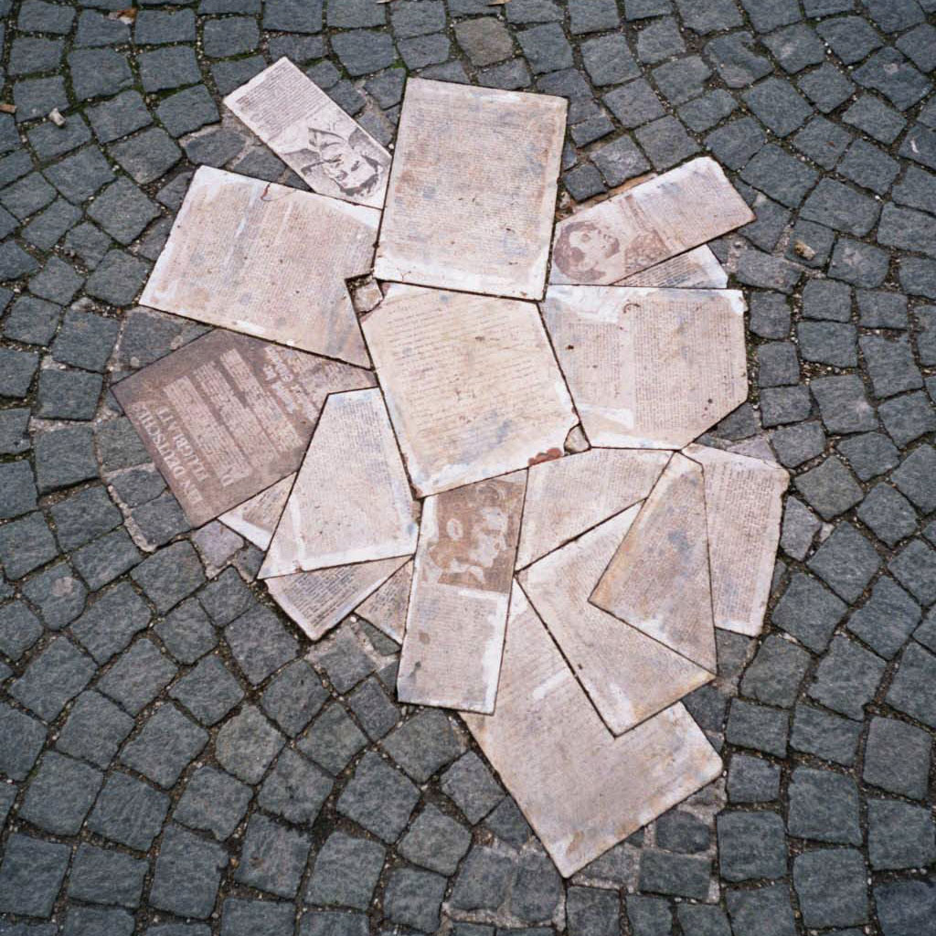 Mahnmal der Geschwister Scholl und die Weiße Rose, vor der LMU, München.